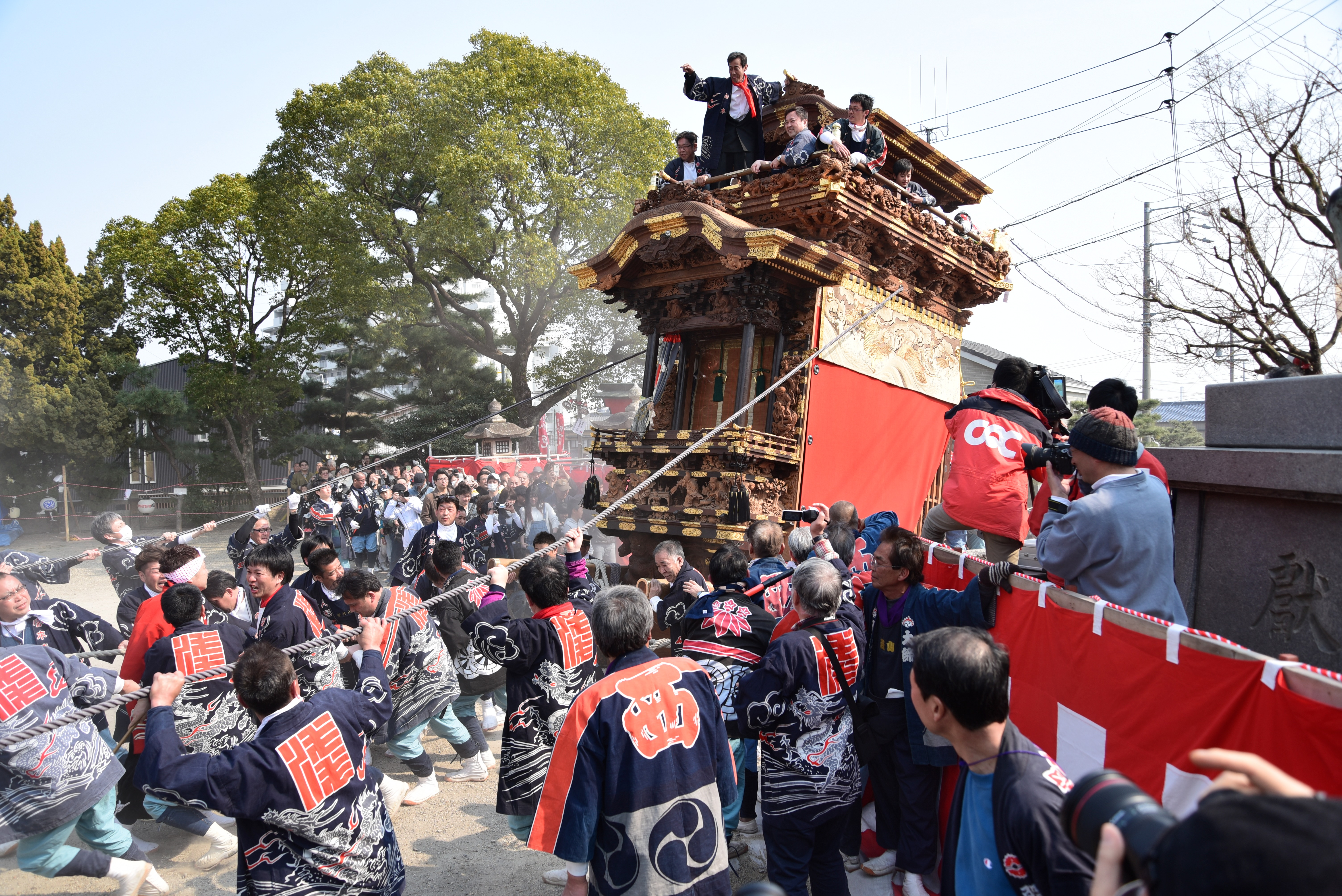 愛知県半田市の乙川祭禮。最大の見せ場である「坂上げ」